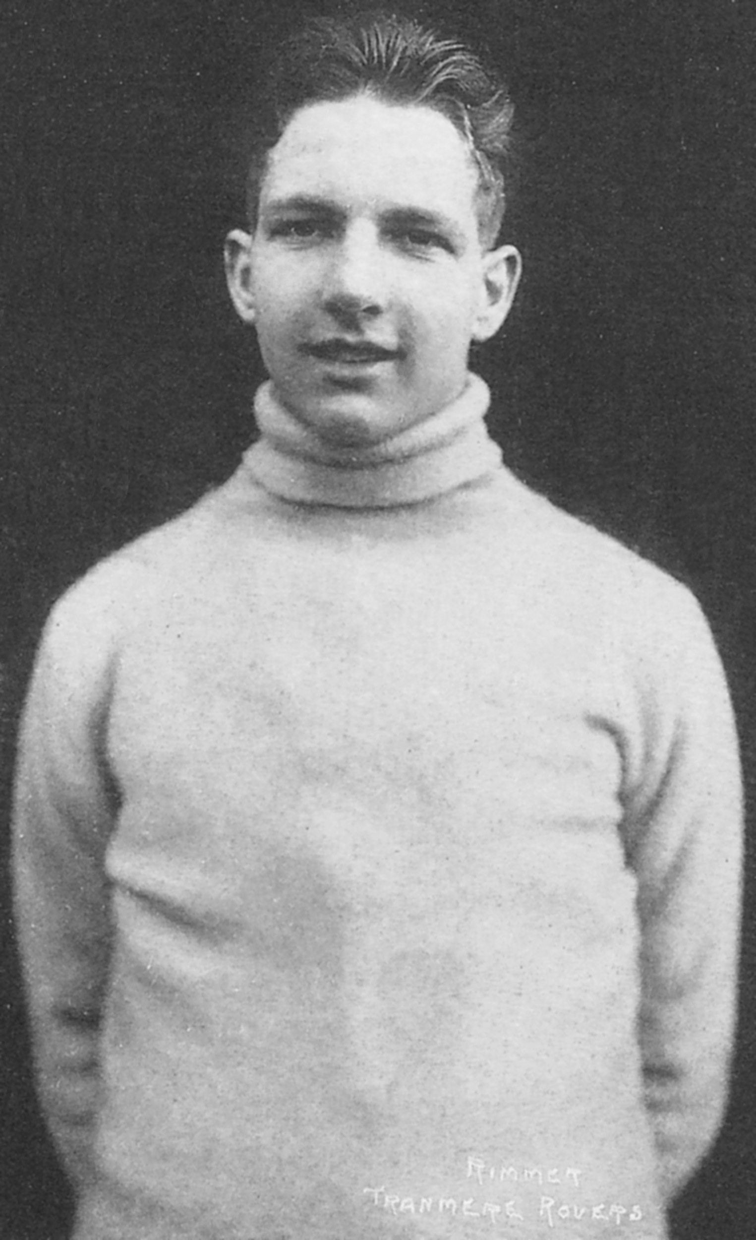 Ellis Rimmer